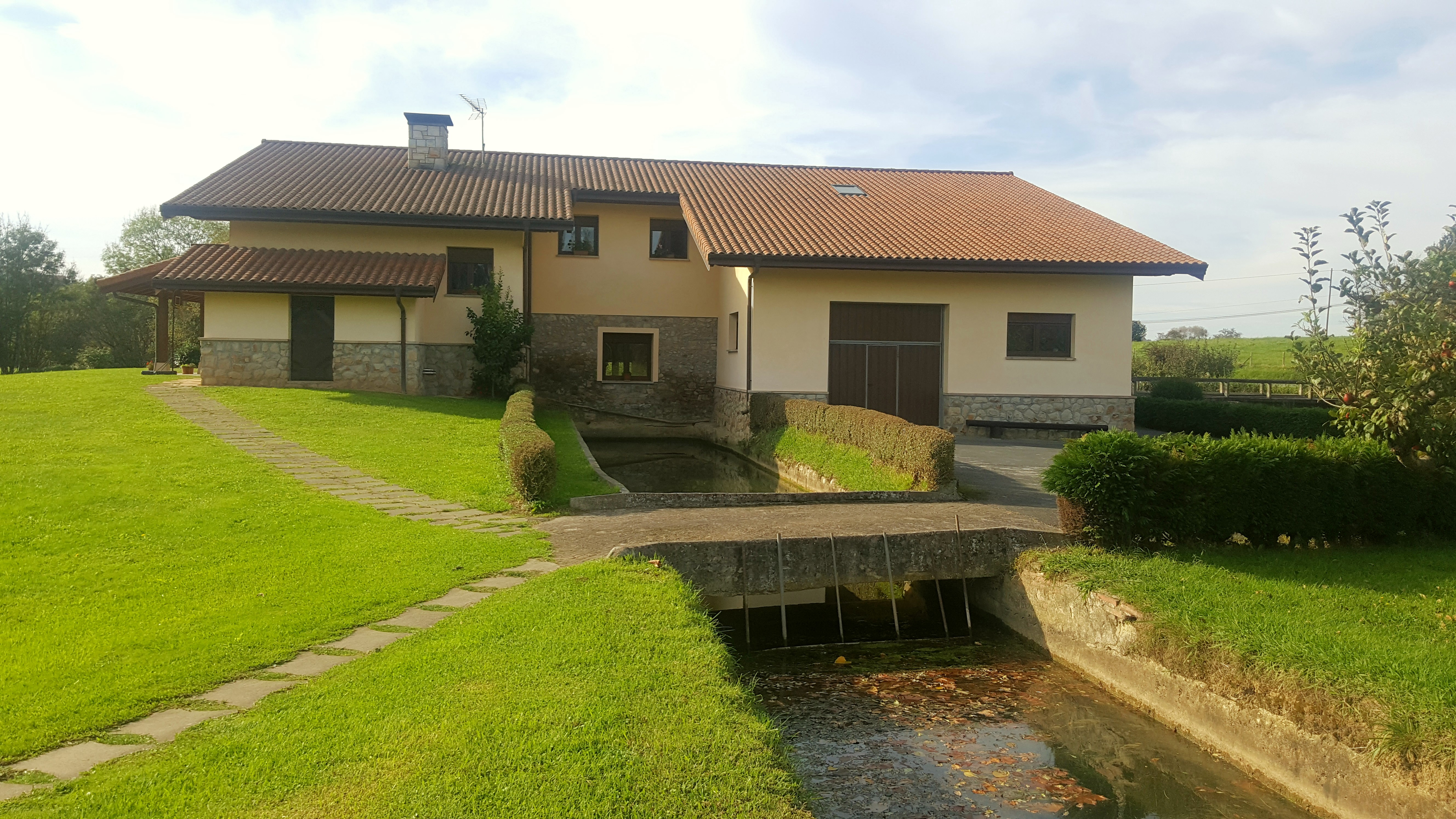 Butroe ibaia. Gamizko Errotabarri errotako ekialdeko ikuspegia.